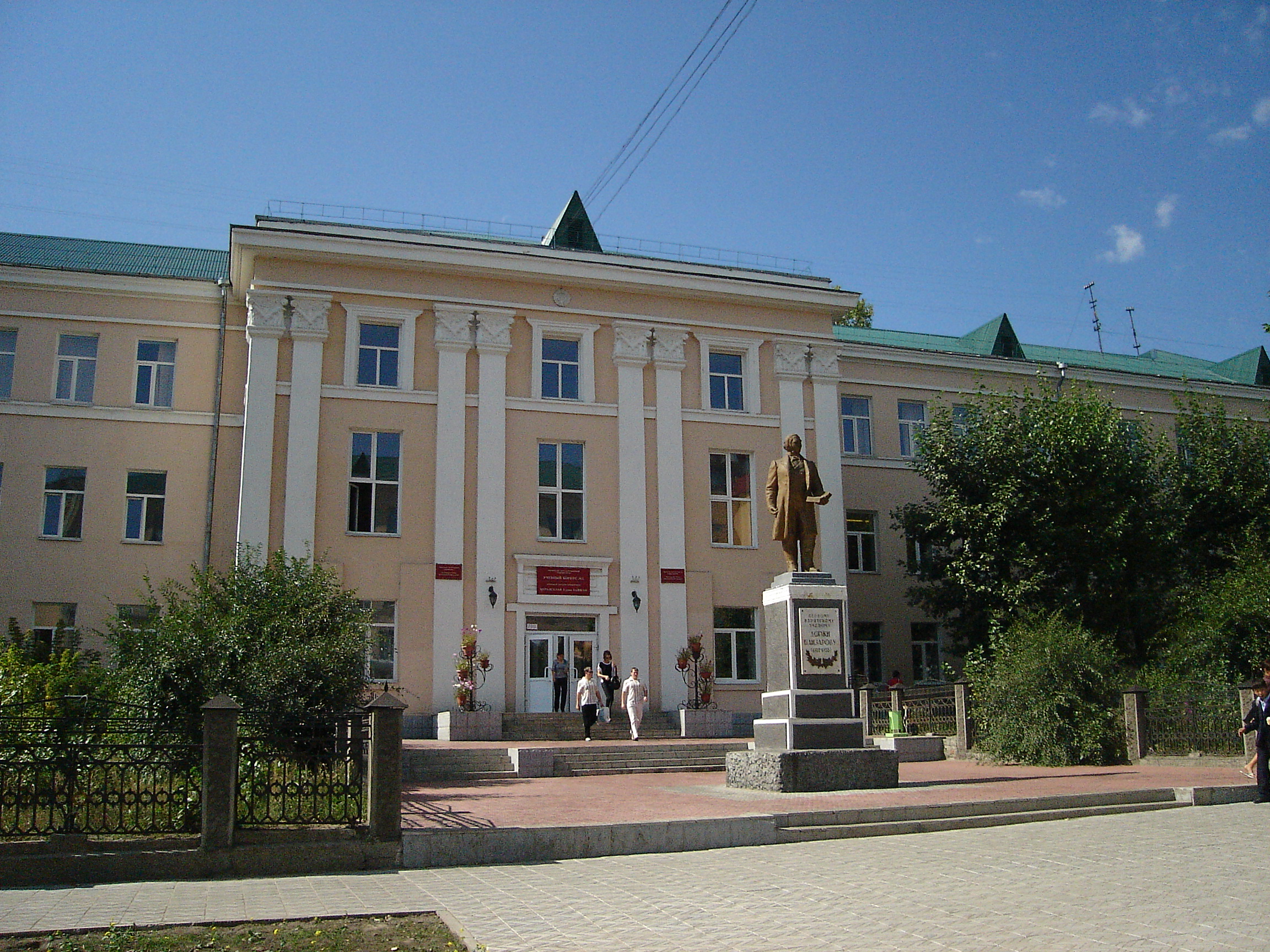 Бурятский государственный университет. 1 корпус. На переднем плане памятник Доржи Банзарову